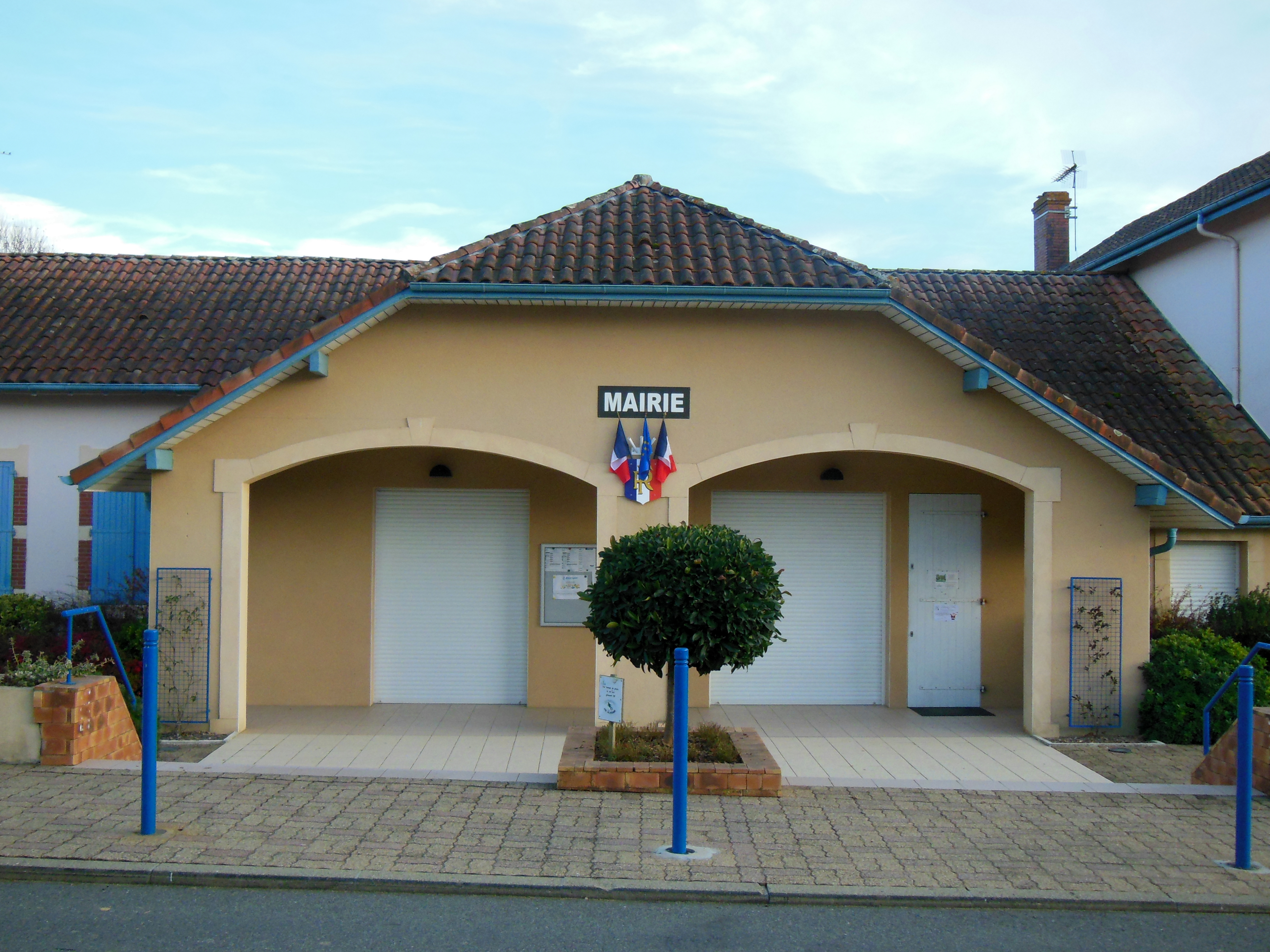 Mairie de Montsoué (Landes, France)